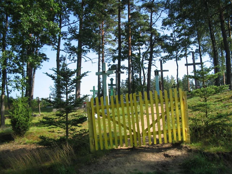 Inkaklių kapinės, Šilutės raj.